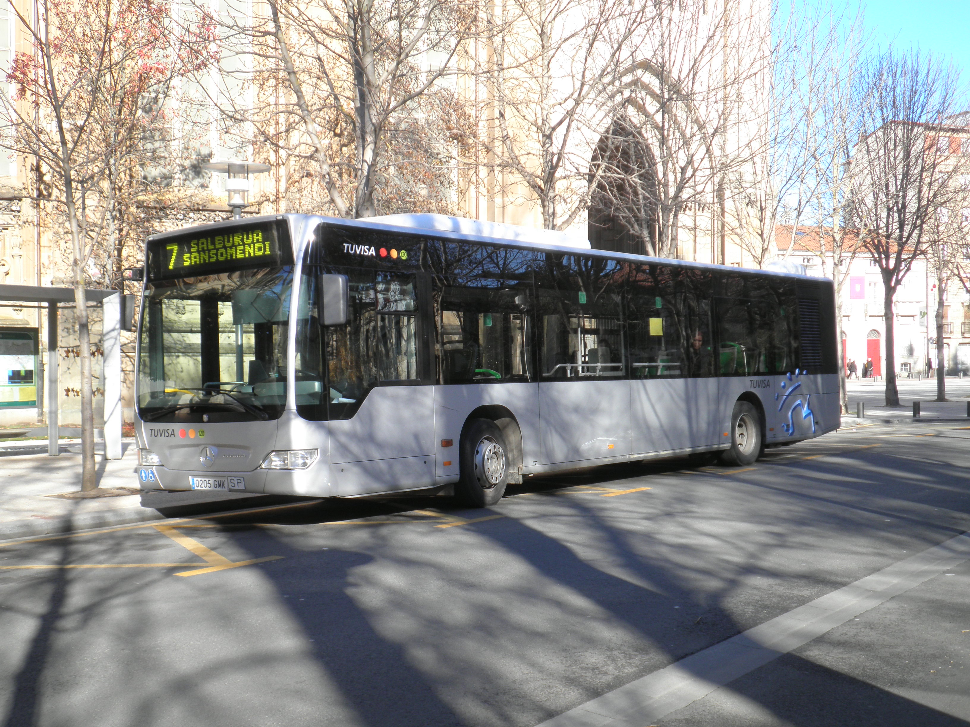 Tuvisa en la Catedral María Inmaculada de Vitoria